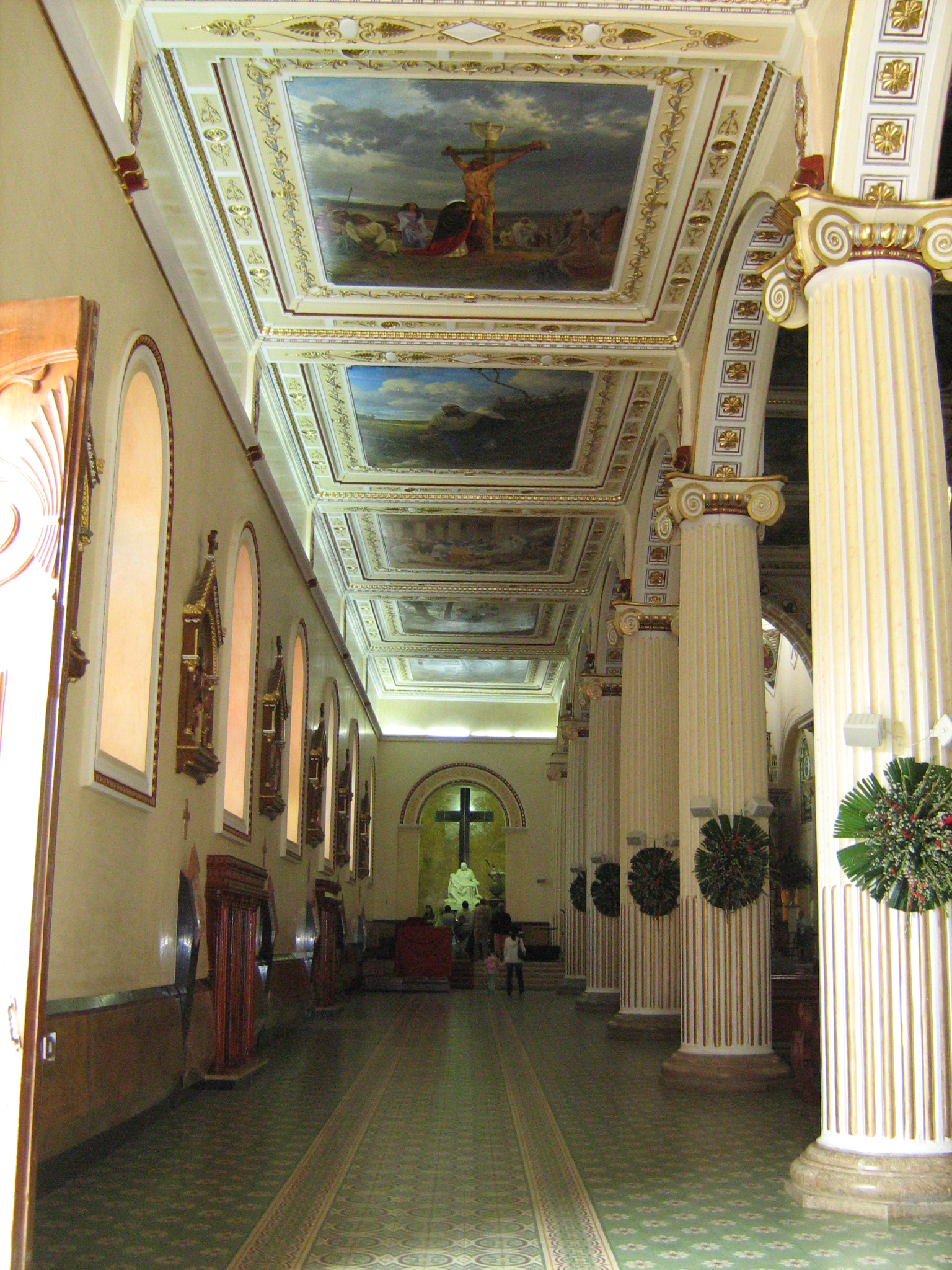 Basílica Menor del Señor de los Milagros del municipio de San Pedro de los Milagros, Antioquia. Colombia.